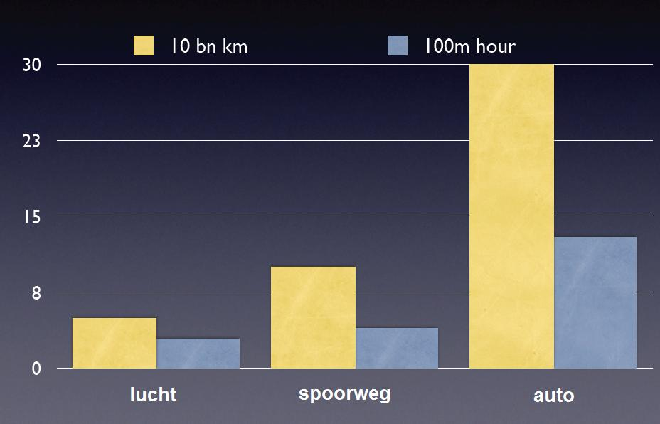 Gegevens Europese Commissie